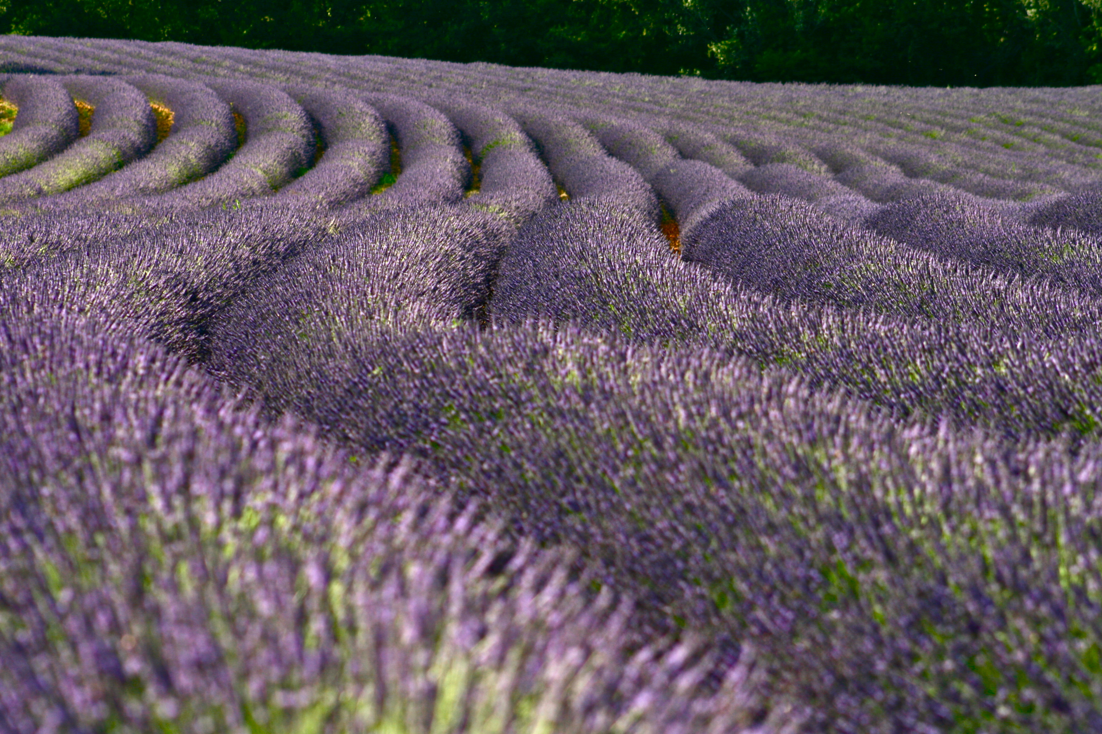 Lavender Fields